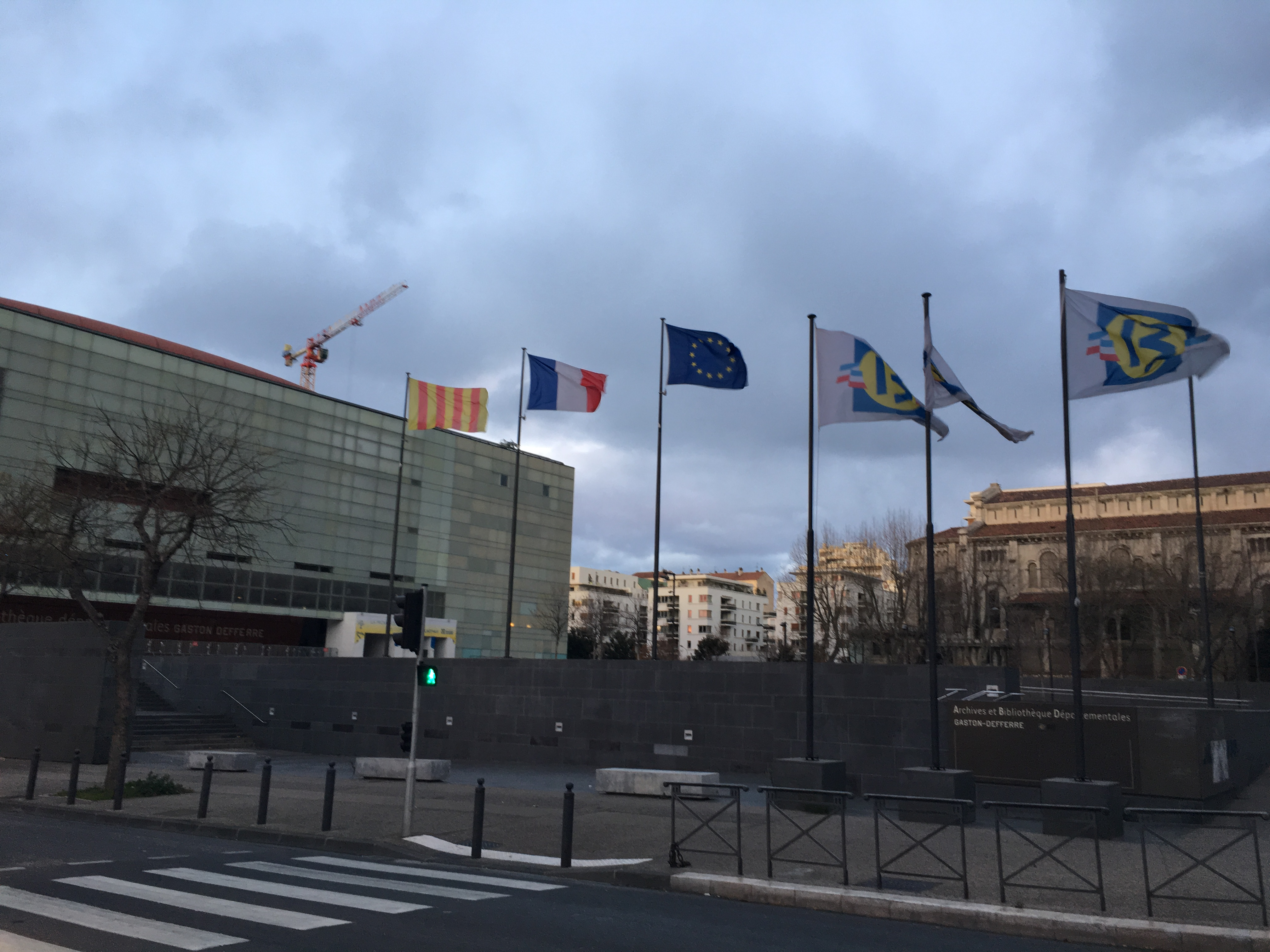 Drapeau sur l'esplanade des Archives et bibliothèque départementales des Bouches-du-Rhône.